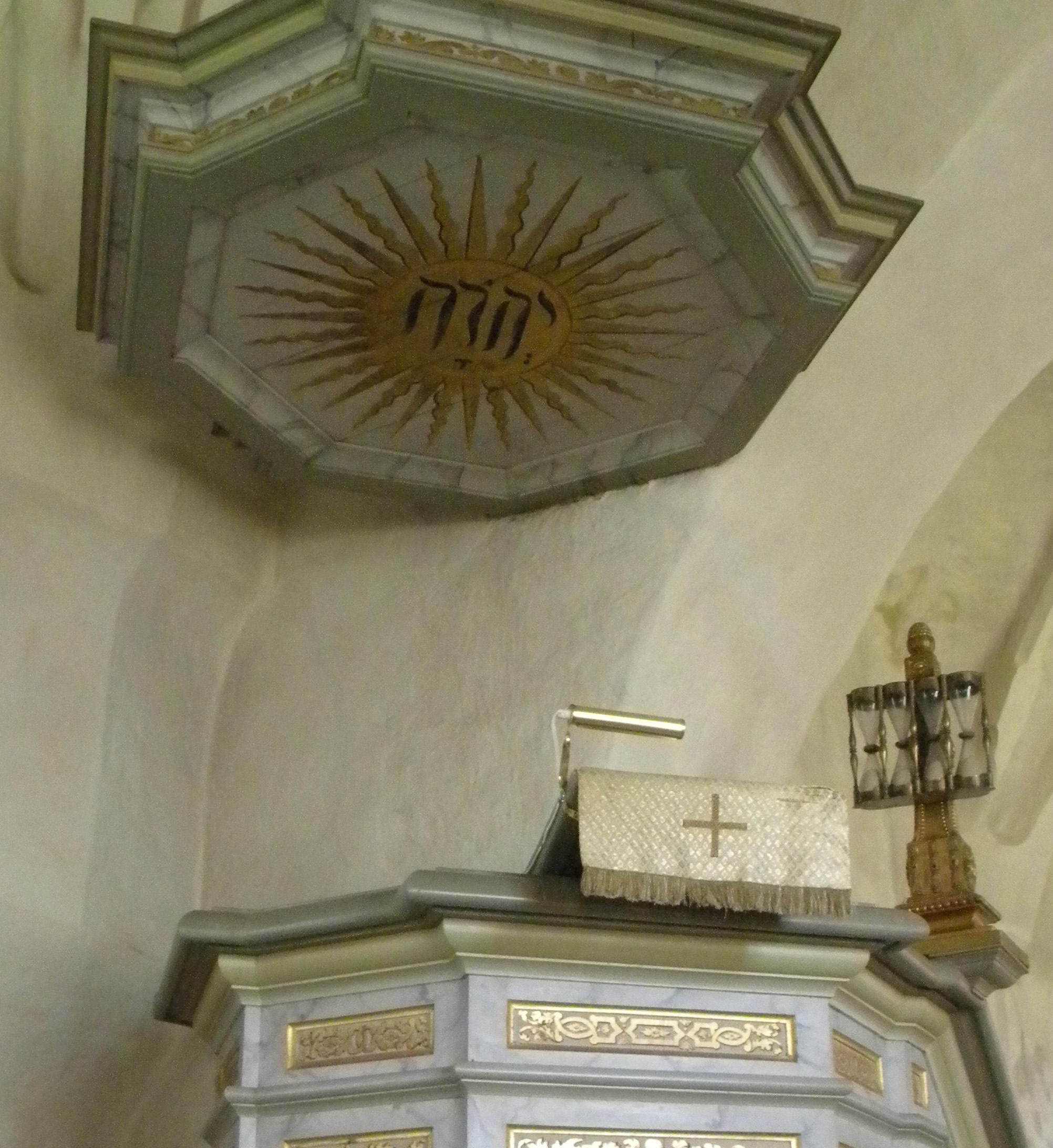 Predikstolens tak med tetragrammet JHWH i Kattnäs kyrka